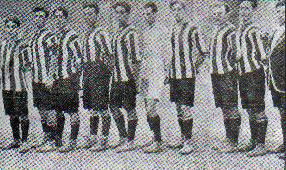 Plantel de Estudiantes de La Plata campeón amateur de 1913.